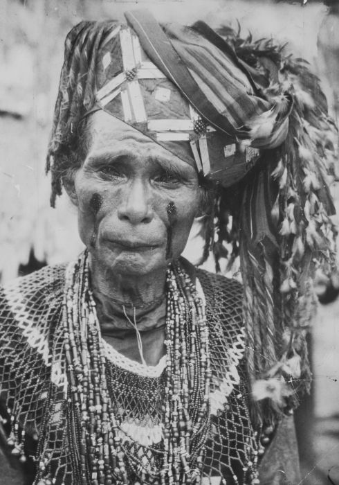 foto. Portret van een Toraja priester op Midden Celebes